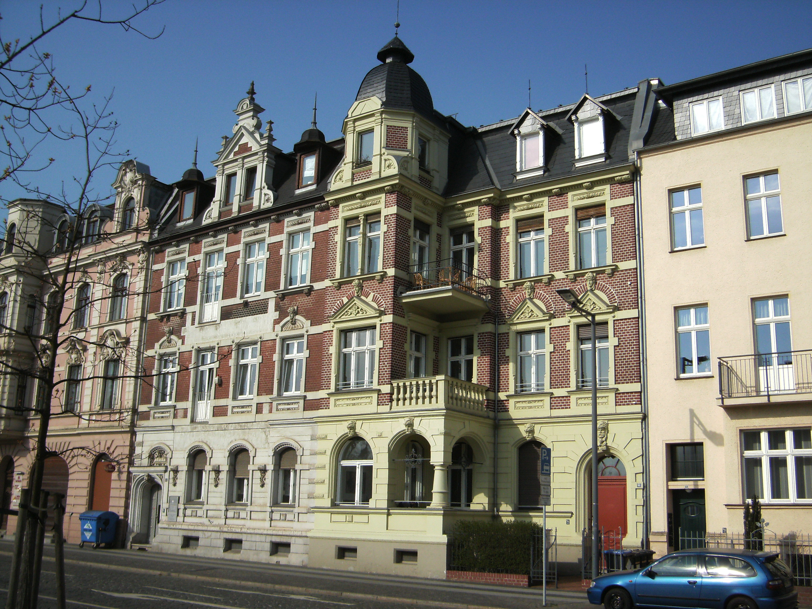 Schillerstraße 52